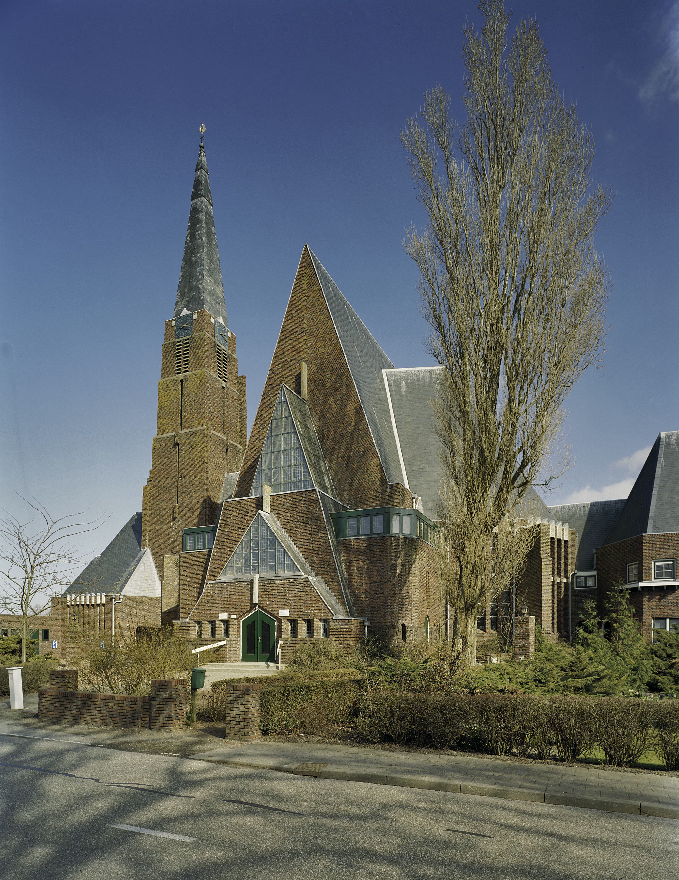 Gereformeerde kerk: Overzicht kerk met hoog zadeldak, ingangsportaal, en toren met naaldspits gezien vanaf straatzijde (opmerking: Gefotografeerd voor Monumenten In Nederland Noord-Holland)